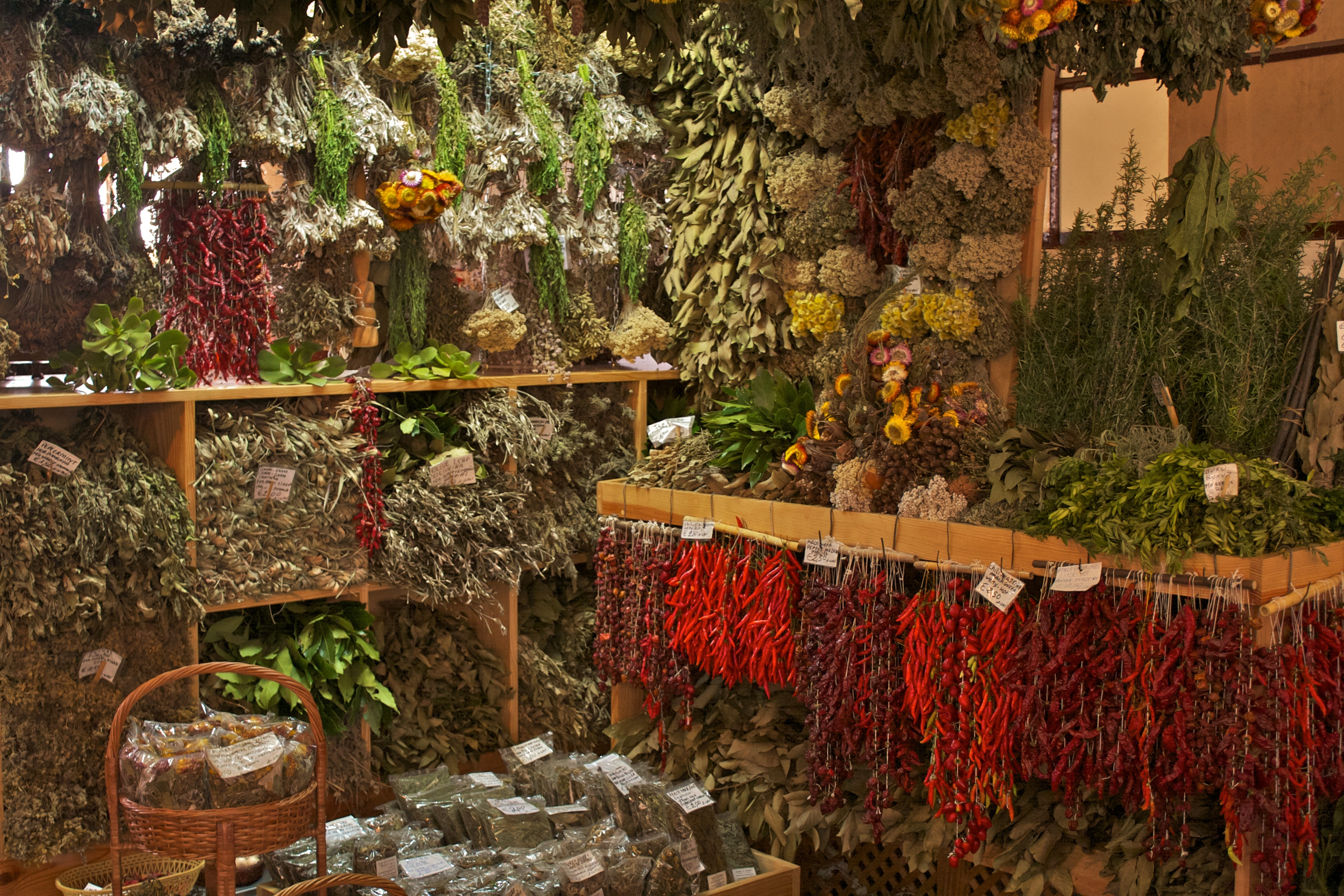 At Mercado dos Lavradores, Funchal